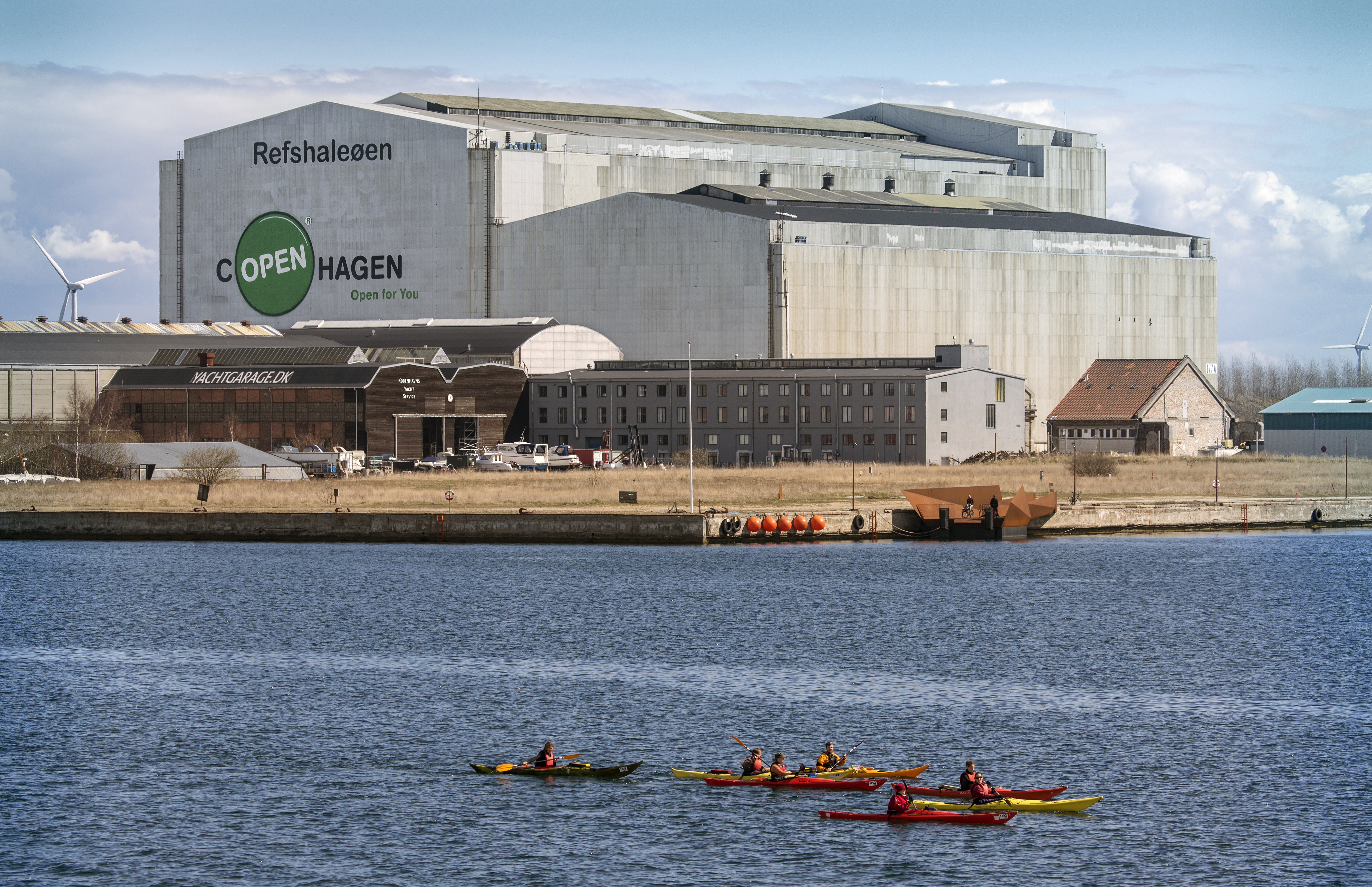 Refshaleøen, Copenhagen, Denmark